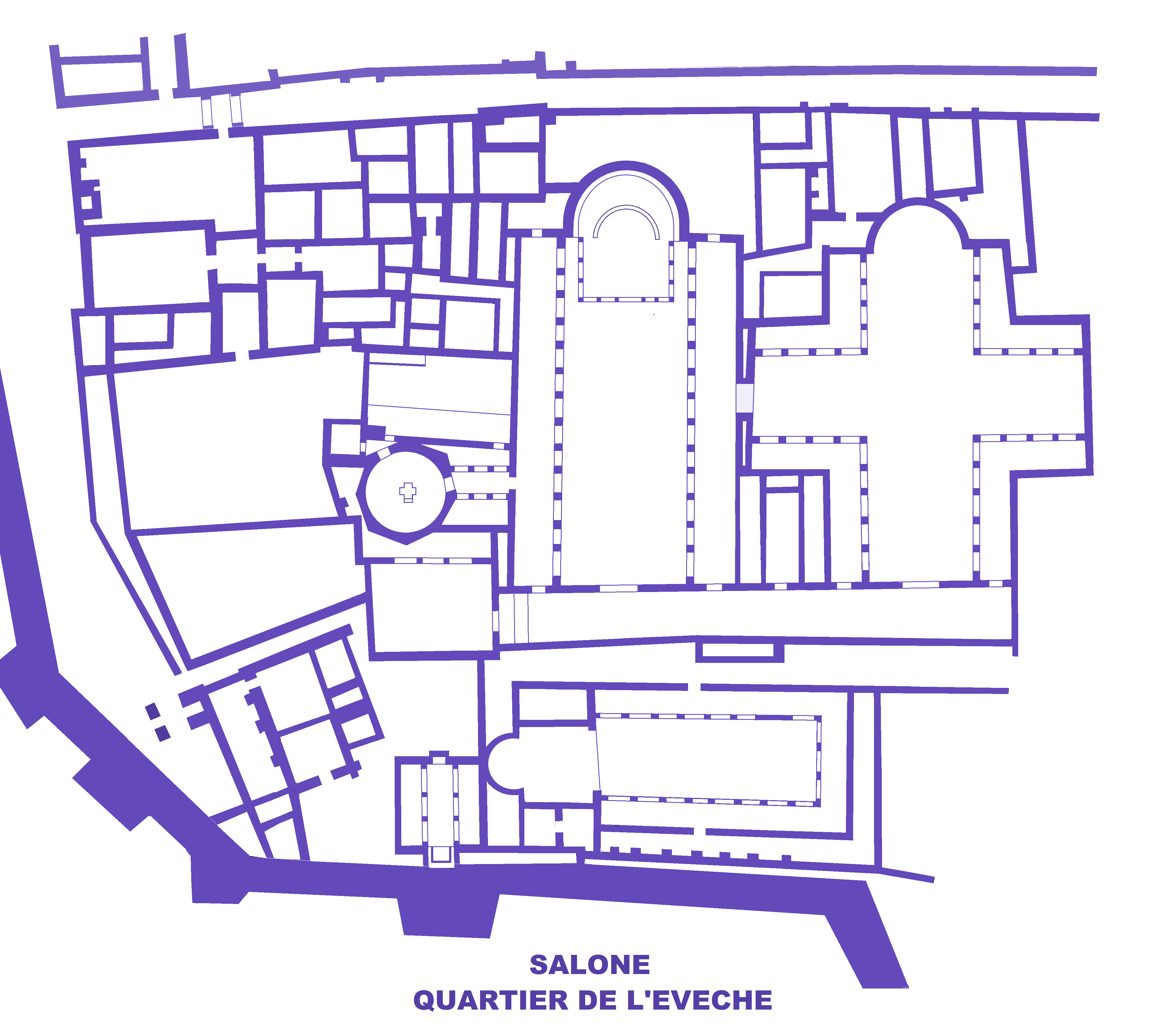 Salone, plan du quartier de l'évêché